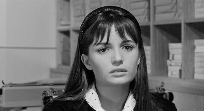 Screenshot dal film Altissima pressione (1965)